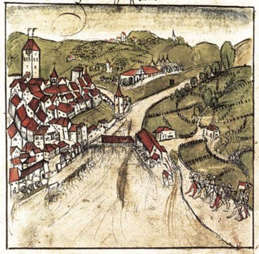 Reussbrücke mit Mühle um 1514, Bremgarten AG, Schweiz: aus der Chronik von Werner Schodoler